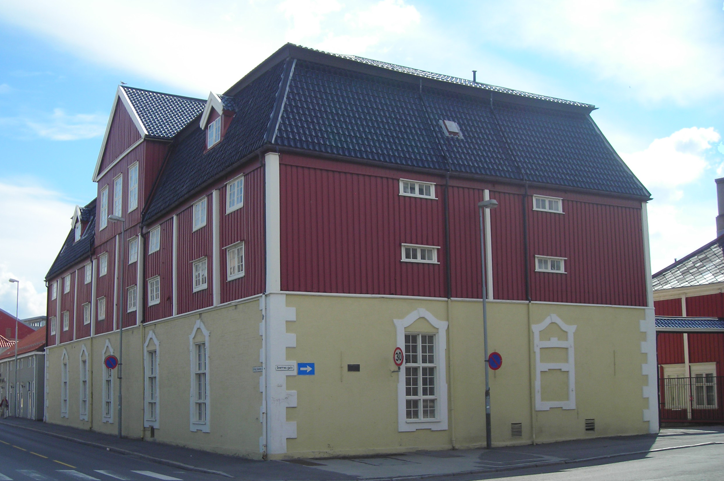 Sukkerhuset in Trondheim, built in 1754